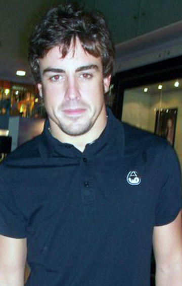 Fernando Alonso shopping at Puma Store in Singapore 2010.